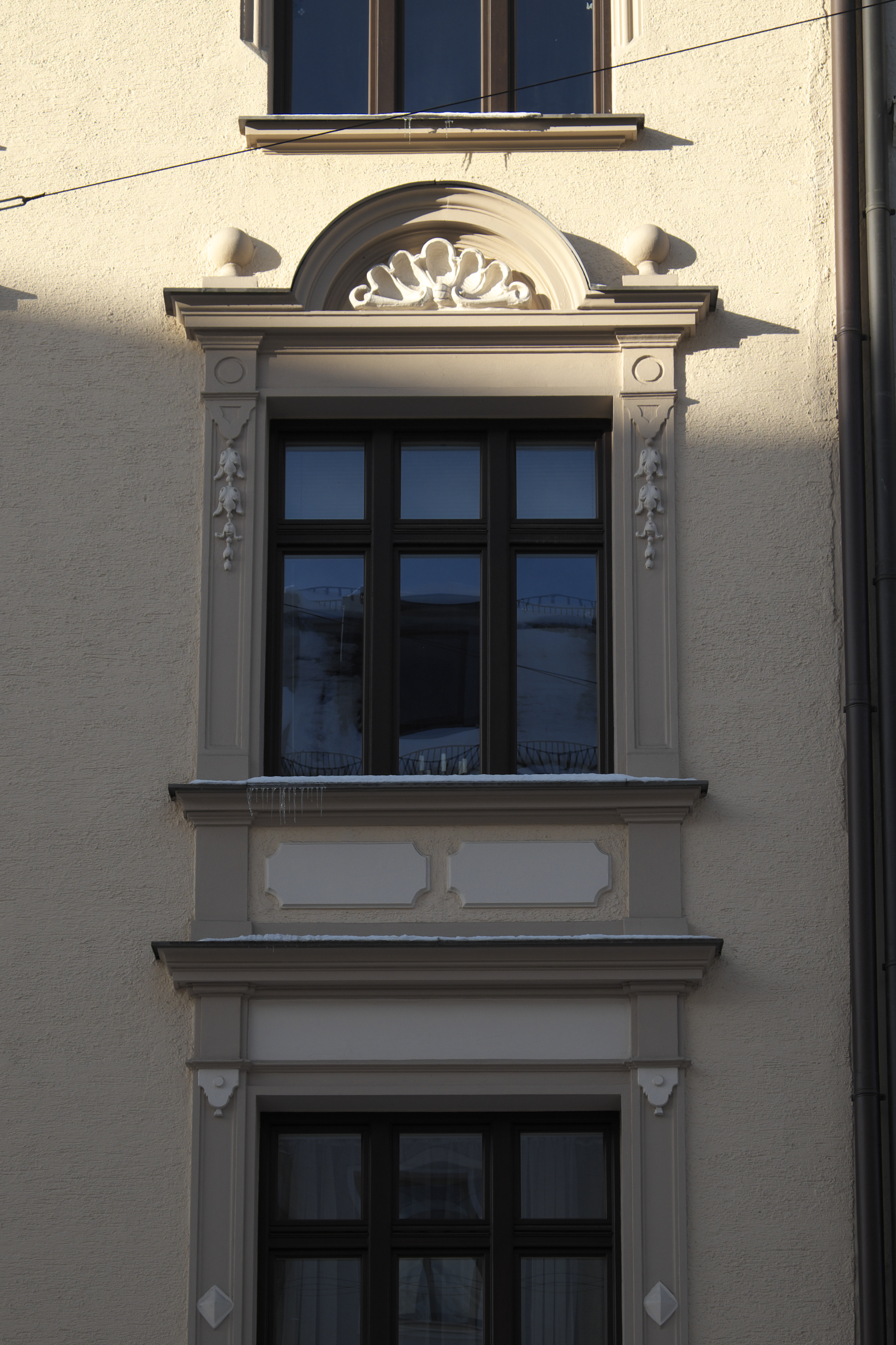 Mietshaus in der Belfortstraße 3 in Haidhausen im Stadtbezirk Au-Haidhausen in München (Bayern/Deutschland), um 1890/1900